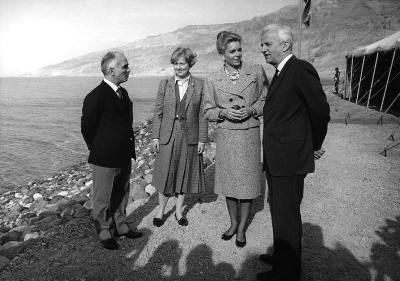 Auf Einladung Seiner Majestät König Hussein Bin Talal statteten der Bundespräsident und Frau von Weizsäcker dem Haschemitischen Königreich Jordanien vom 3. bis 5. Februar 1985 einen Staatsbesuch ab. Im Anschluß an den Besuch in Jordanien hielt sich das Präsidentenpaar auf Einladung von Präsident Mohamed Hosni Mubarak bis zum 8. Februar in der Republik Ägypten auf. Bis zum 6. Februar wurde Bundespräsident Dr. Richard von Weizsäcker von dem Bundesminister des Auswärtigen, Hans-Dietrich Genscher, begleitet. Im Bild: Am Toten Meer - 4. Februar 1985 v.l.r.: König Hussein Bin Tatal, Frau Marianne von Weizsäcker, Königin Noor, Bundespräsident Dr. Richard von Weizsäcker Information added by Wikimedia users.Erg. zu Abgebildete Personen: Marianne von Weizsäcker, Bundesrepublik Deutschland (GND 117308218) Königin Noor, Königreich Jordanien (GND 124534872)